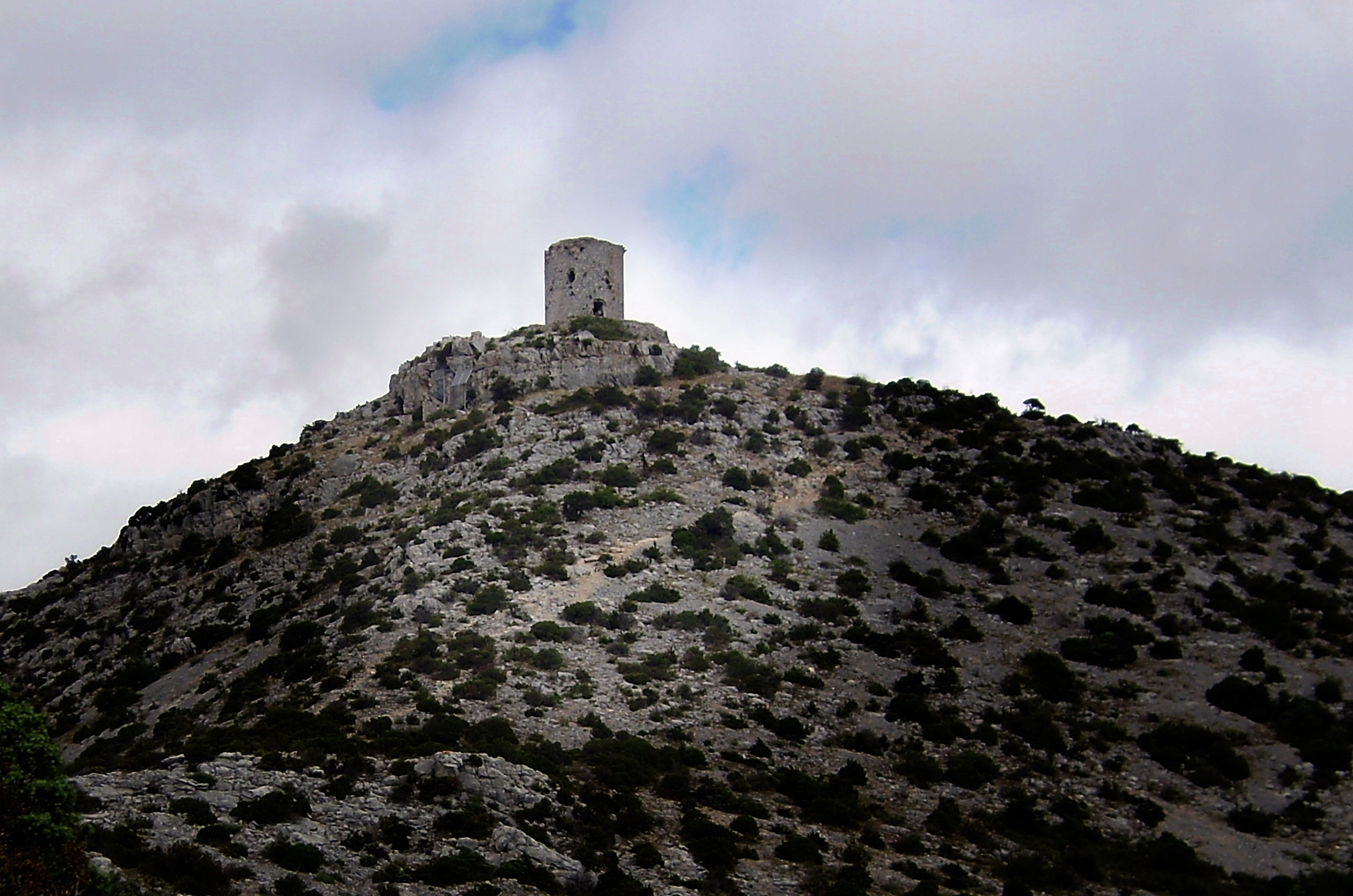 Tour del Far dans le département : Elle domine la plaine du roussillon et surplombe la vallée de l'agly .